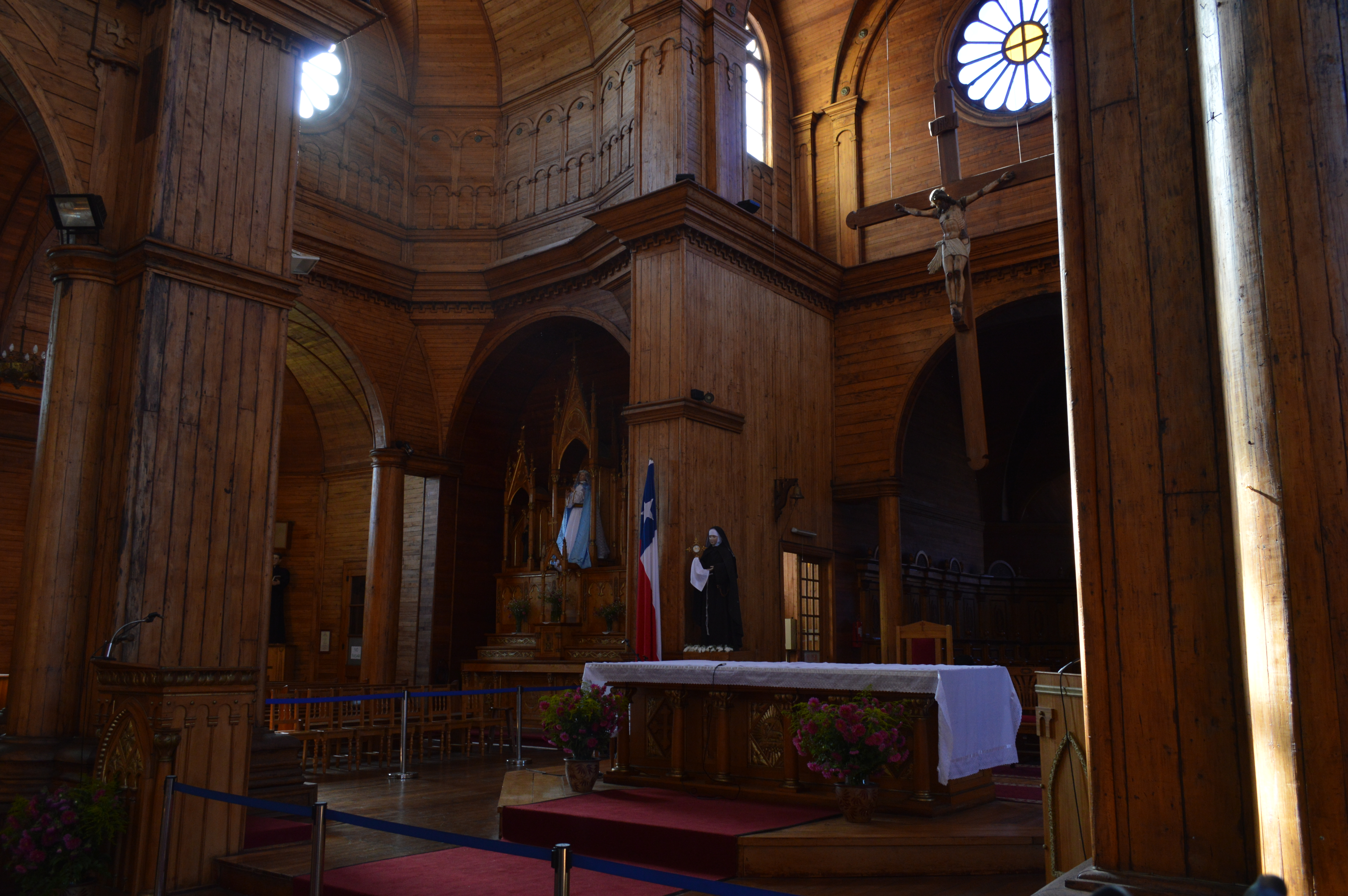 Altar Principal de la Iglesia de San Francisco